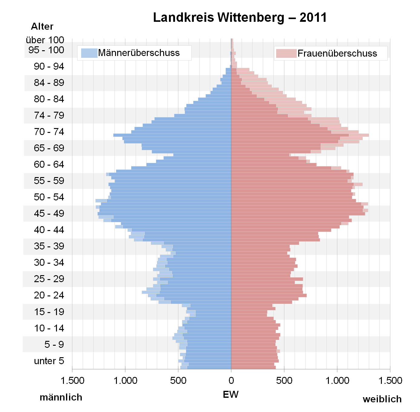 Bevölkerungspyramide des Landkreises Wittenberg nach Zensus 2011.